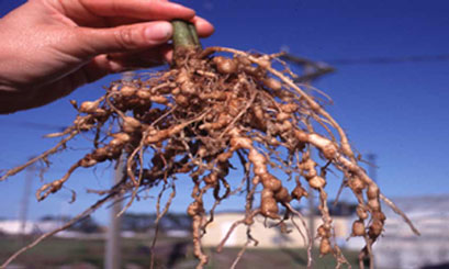 Nematode galls on vegetable roots [1]